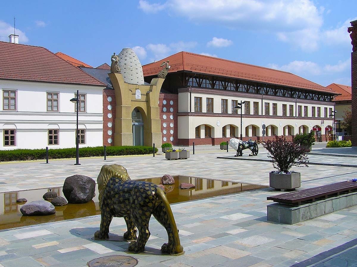 Μετωπική άποψη στο εργοστάσιο